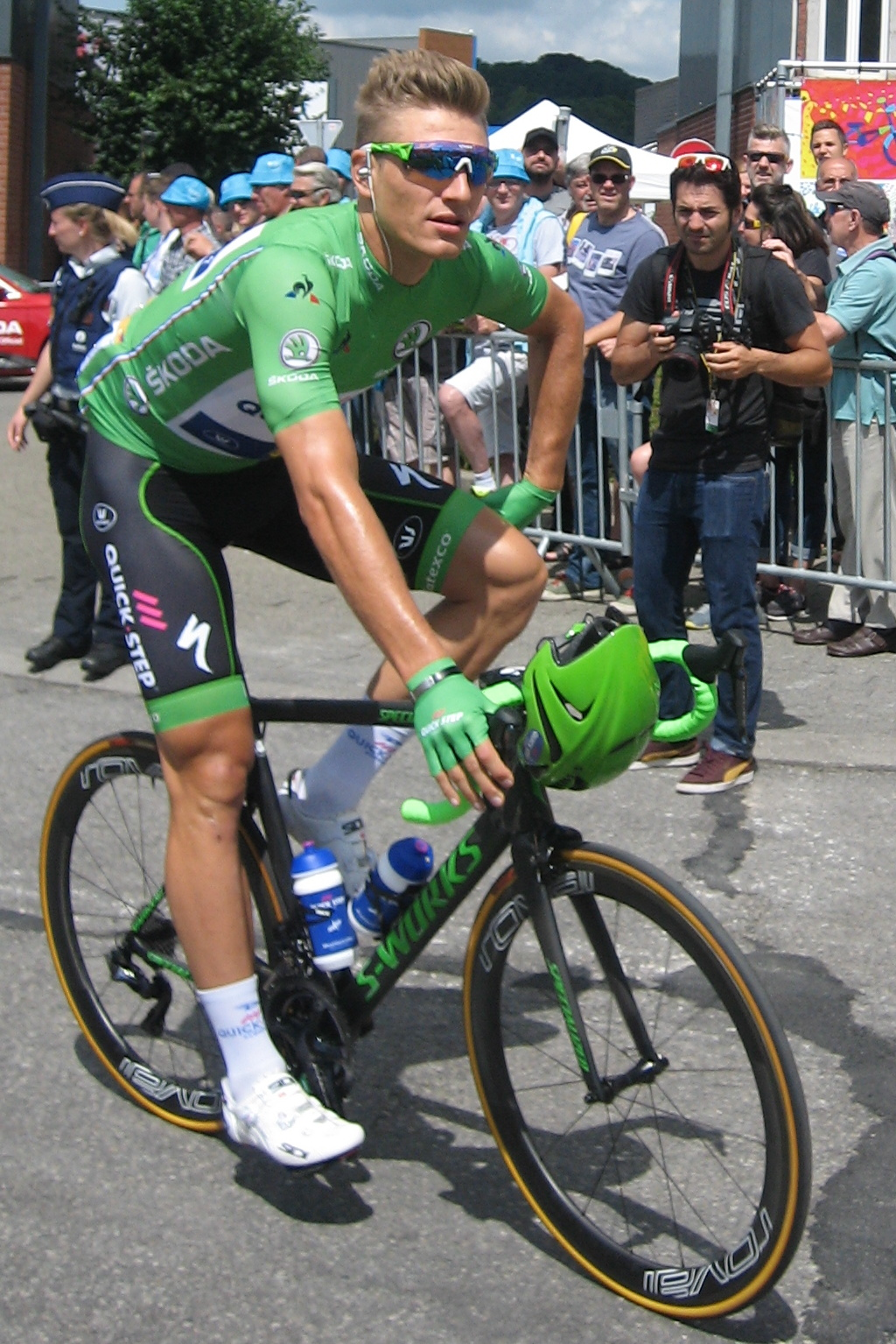 Start in Verviers (België) van de 3e etappe van Le Tour de France 2017.